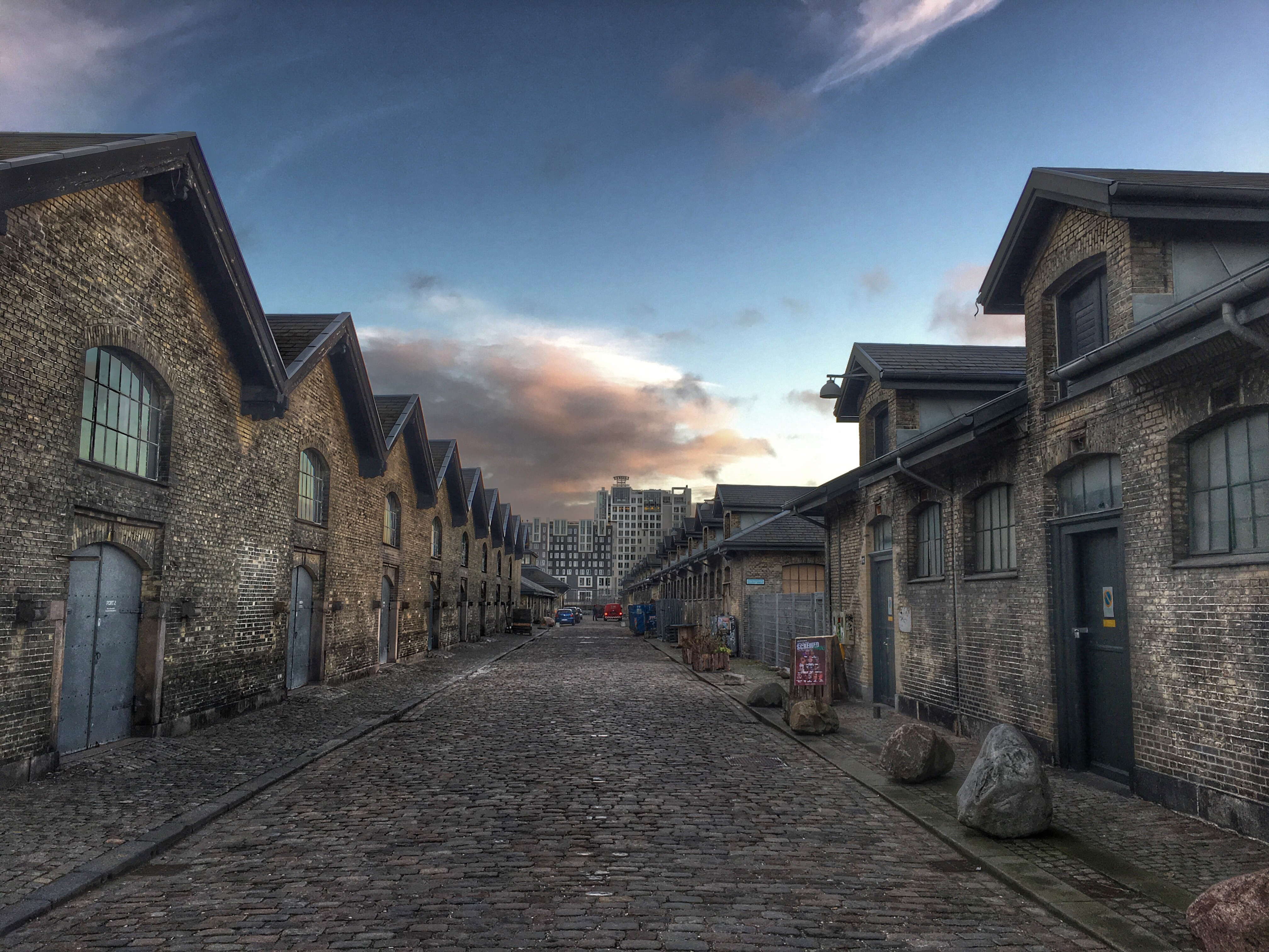 Halmtorvet